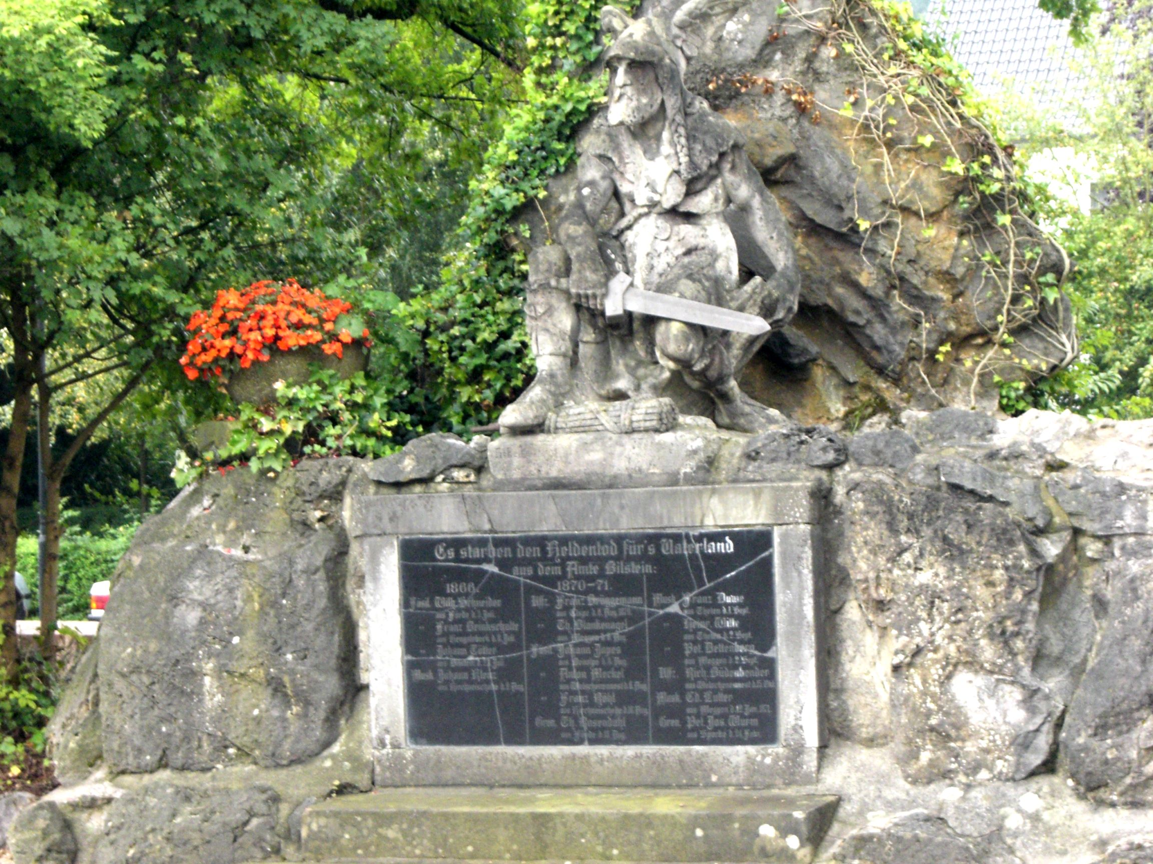 Kriegerehrenmal Maloe in Grevenbrück aus 1904